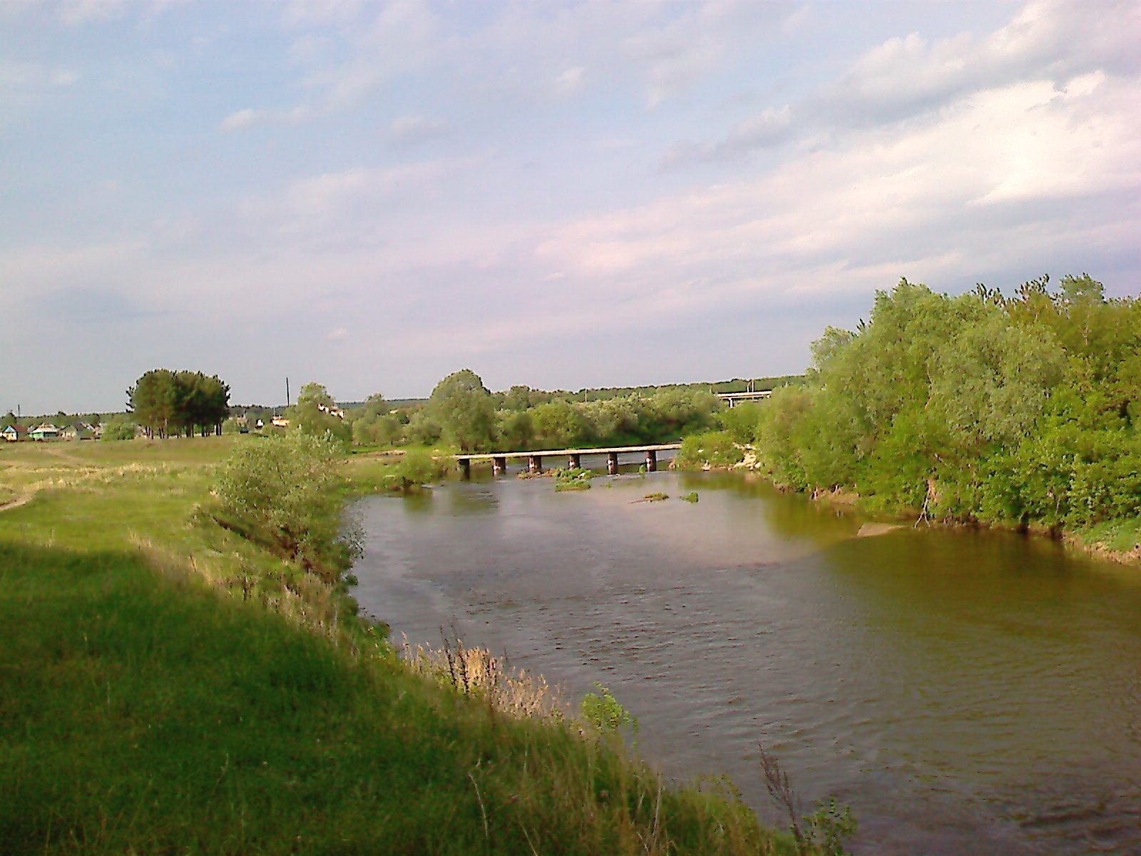 Вид на Армянский мост в посёлке Беково. Пензенская область. 2010 год